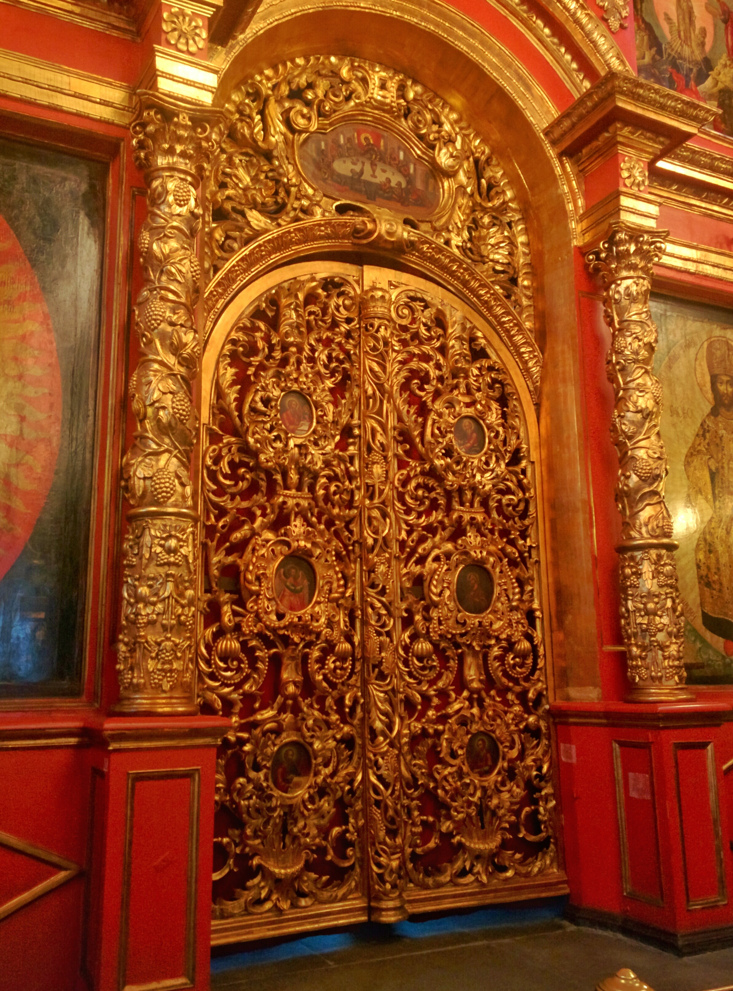 Архангельский собор: нет адреса БТИ, Тверской, Центральный округ, Москва